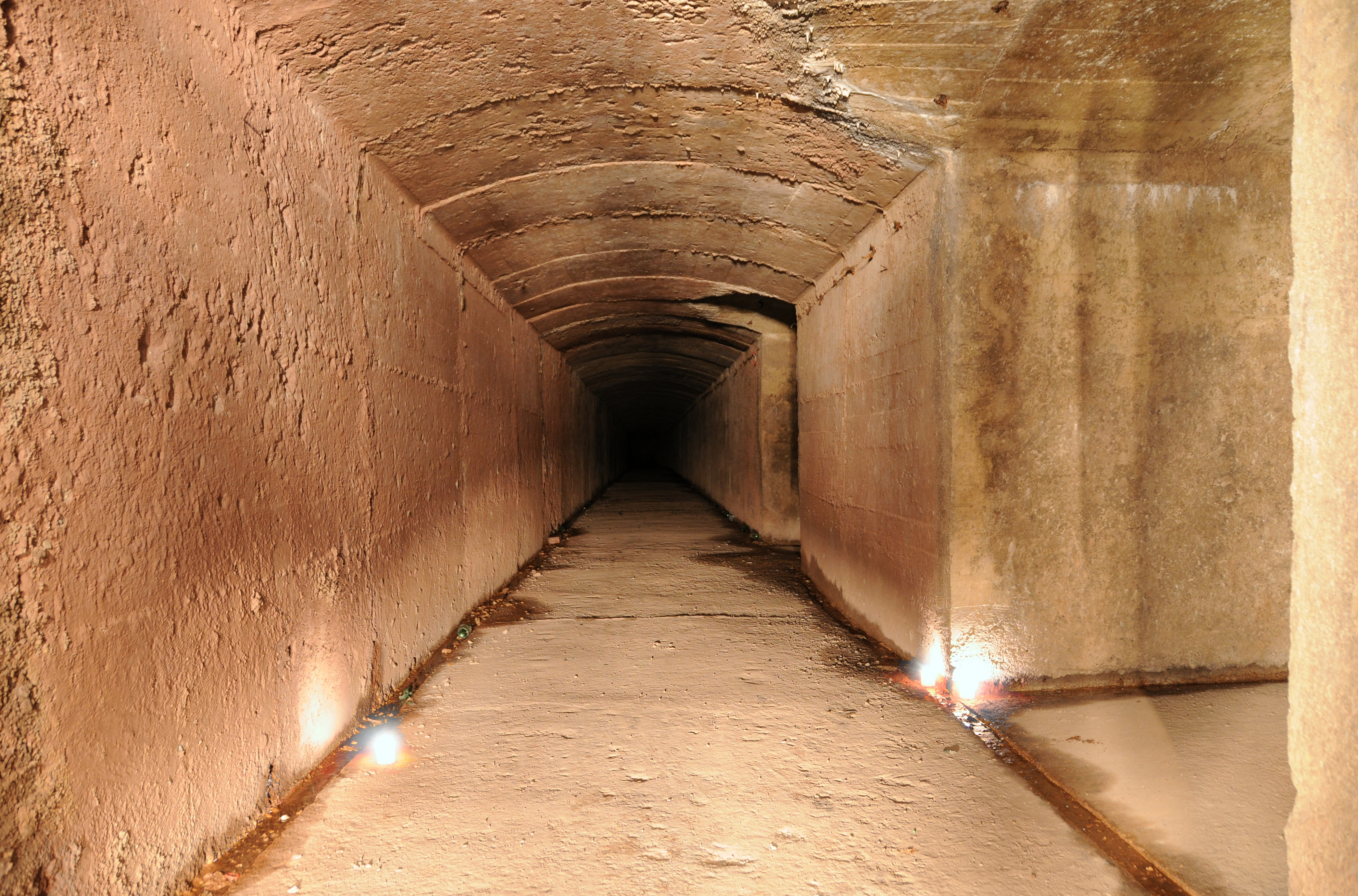 Souterrain reliant l'abri-caverne au fort.. Technique de prise de vue :. Plusieurs photos de 30 secondes chacune. Pendant le temps de pose, j'ai éclairé le souterrain avec une torche (lightpainting).. Sur 3 photos, j'y ai placé une bougie. C'est pour cela que l'on voit 3 bougie.. Under the Roppe fortifications.